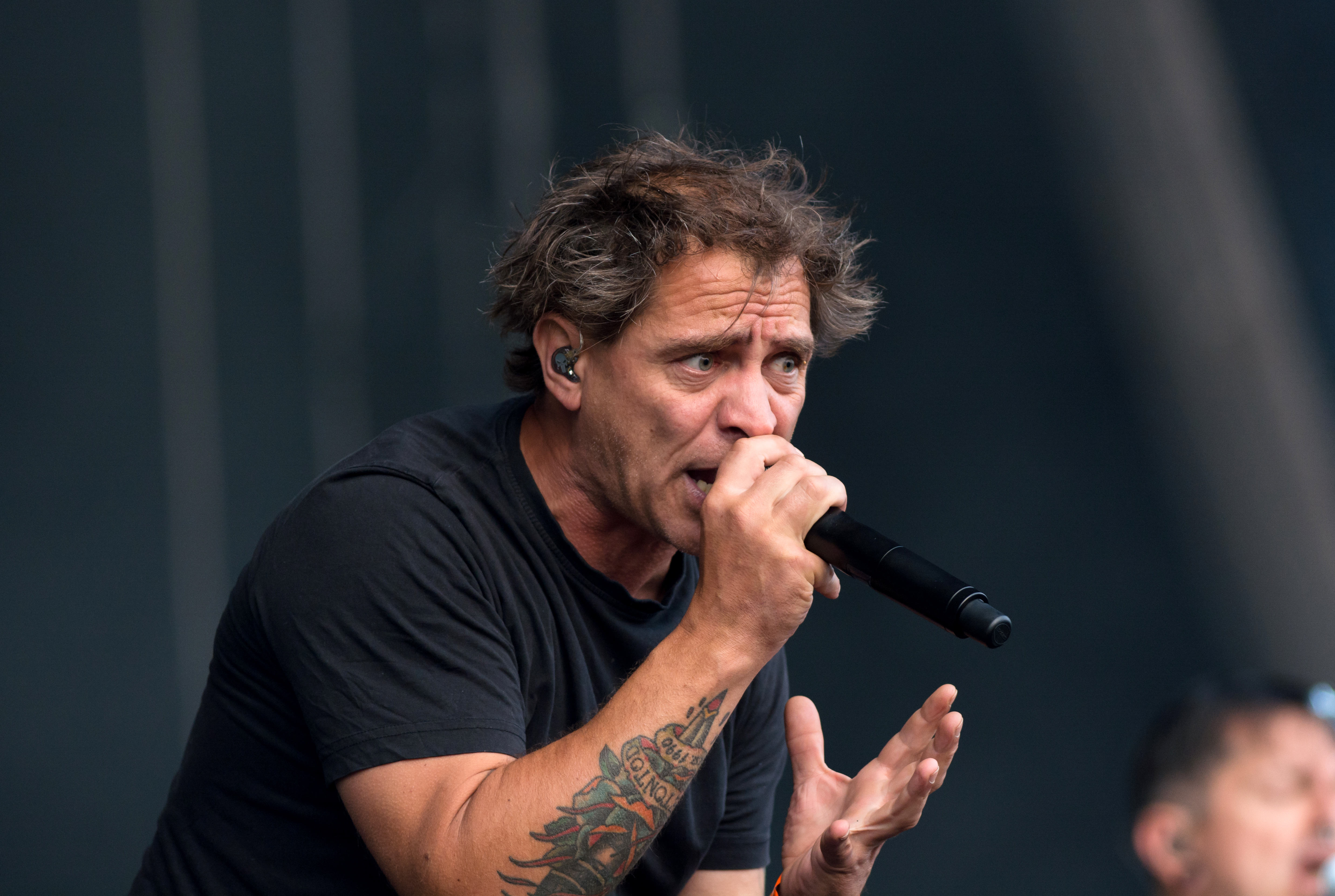 Betontod live bein Reload Festival 2017